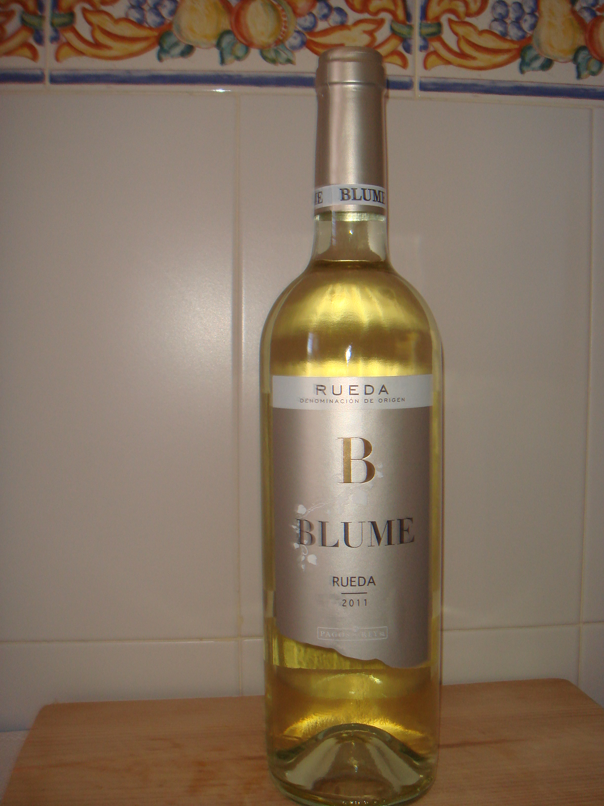 Una botella de vino de Rueda, provincia de Valladolid, España.